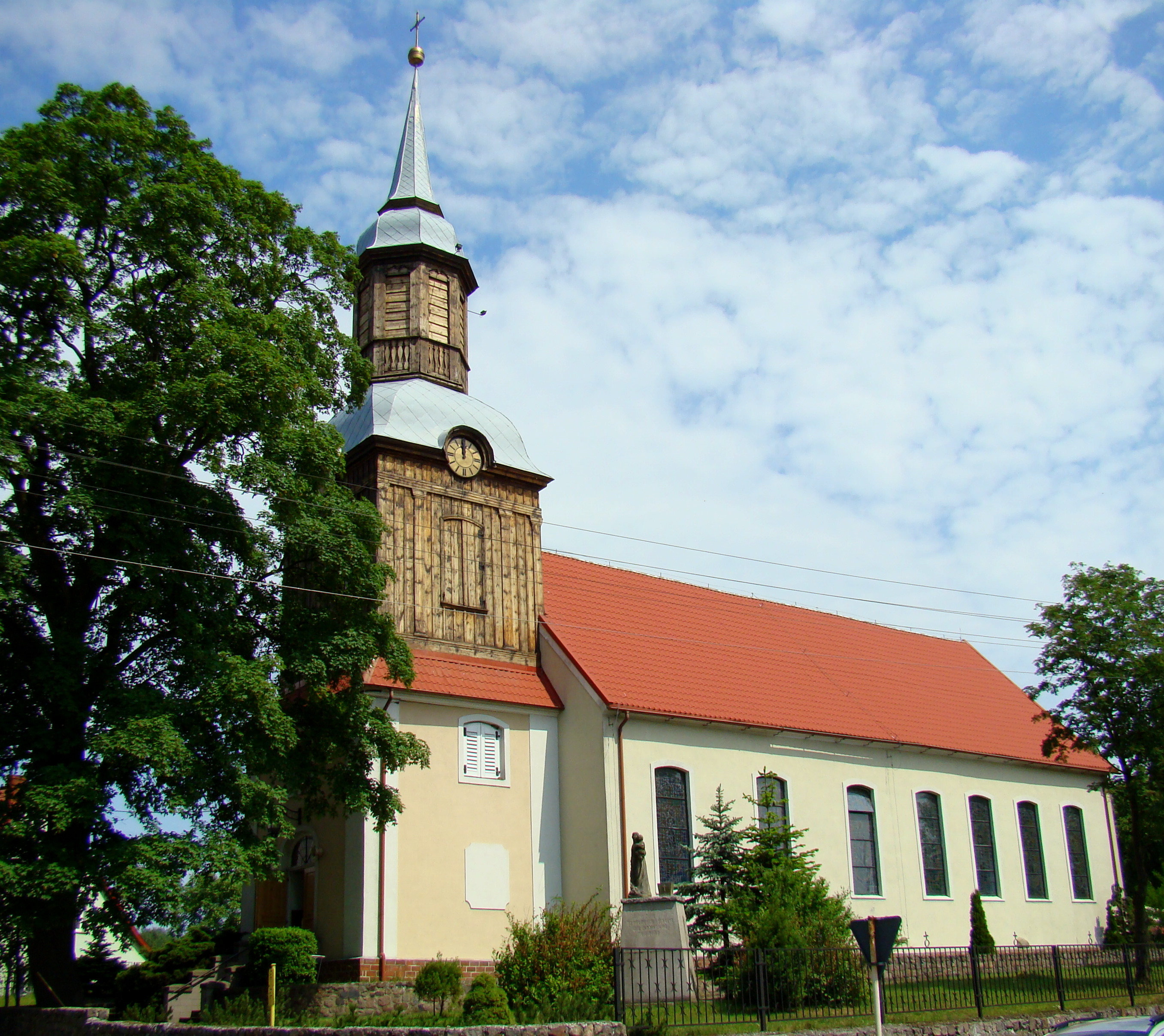 Kościół Podwyższenia Świętego Krzyża w Trzebieży, (Gmina Police, Województwo zachodniopomorskie), Polska